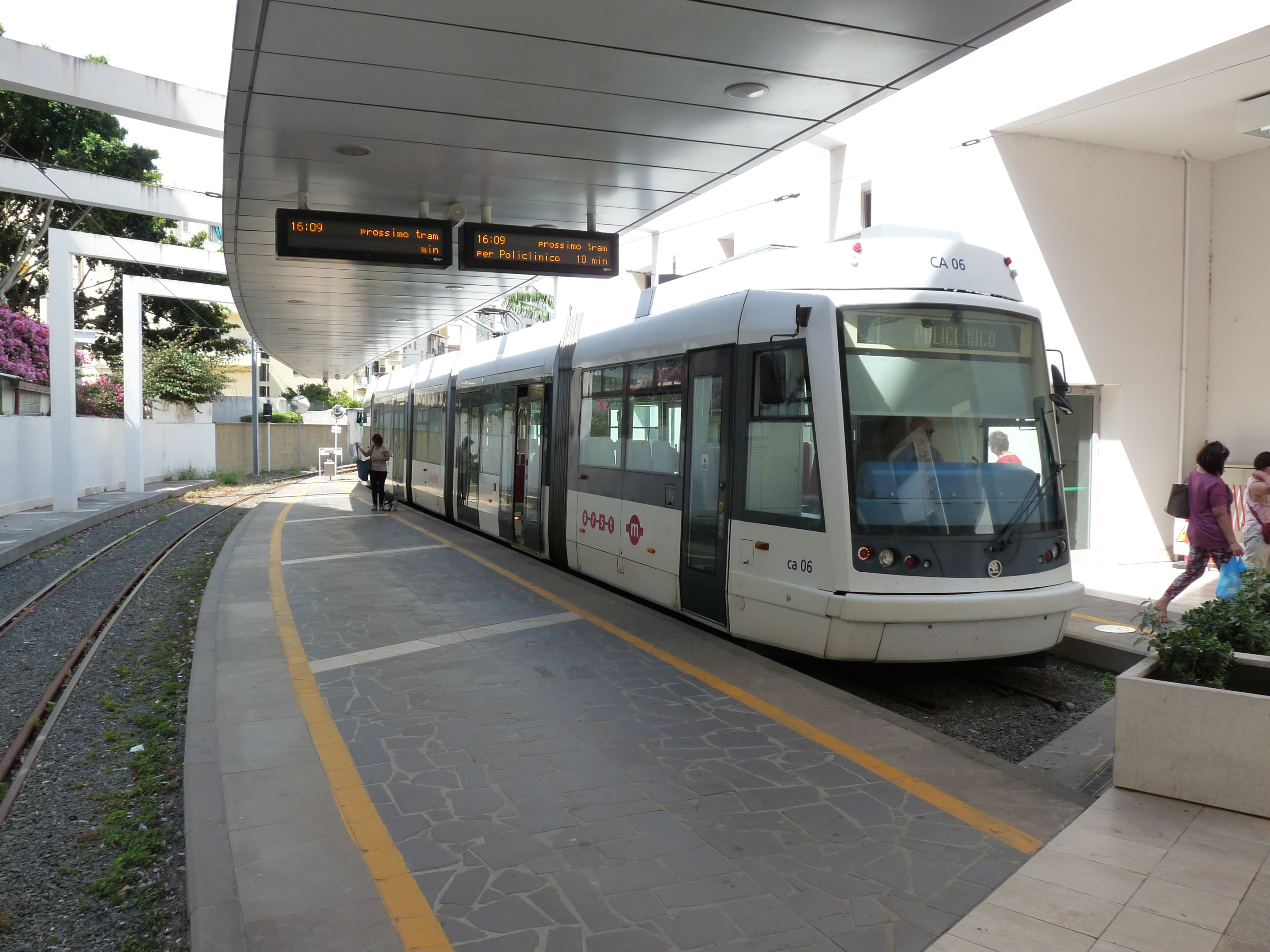 De tram in Gagliari bij het eindpunt Piazza Repubblica.